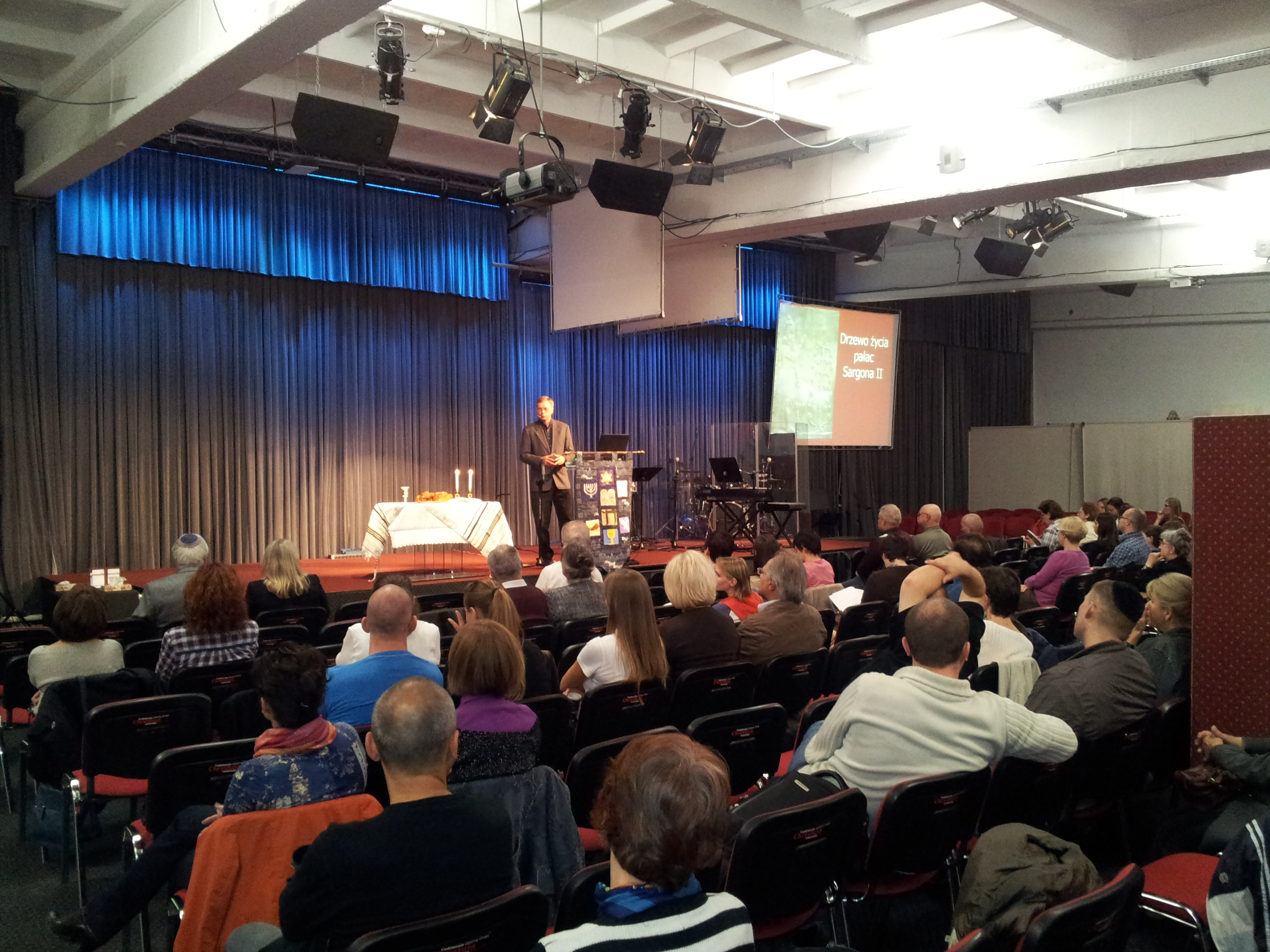 Alfred Palla podczas wykładu "Tajemnice Biblii i starożytności: Odkrycie Niniwy" w Kościele Chrystusowym "Społeczność Chrześcijańska Północ" w Warszawie we wrześniu 2012 roku.